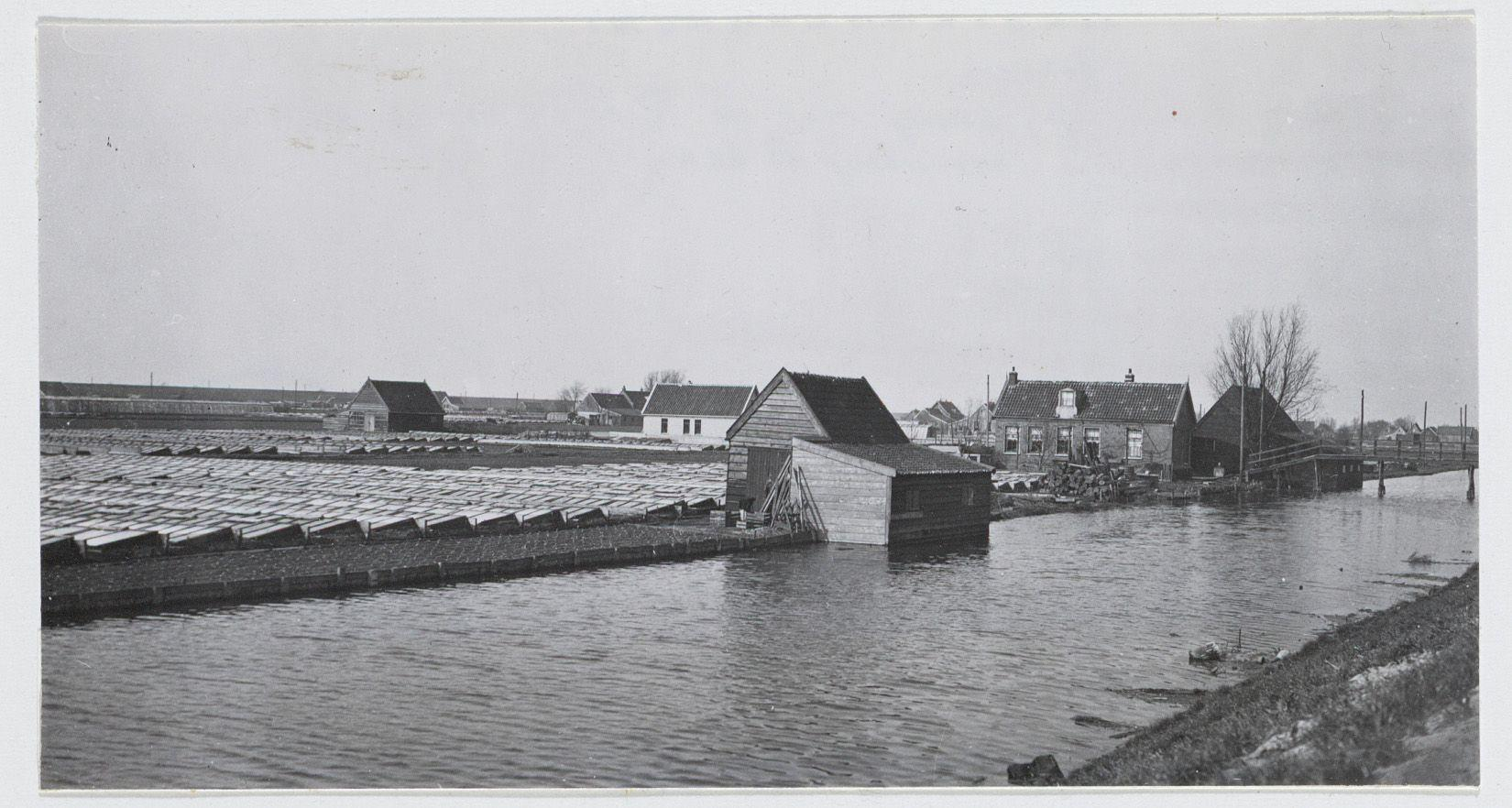 Beschrijving Westlandgracht Gezien in noordwestelijke richting. Op de achtergrond rechts de brug voor de Rietwijkerstraat. Links daarbij boerderij E320. Documenttype foto Vervaardiger Eck, J. van (Jacobus, 1873-1946) Collectie Collectie J. van Eck: foto's Datering 1935 Geografische naam Westlandgracht Inventarissen Afbeeldingsbestand A01634001625 Generated with Dememorixer